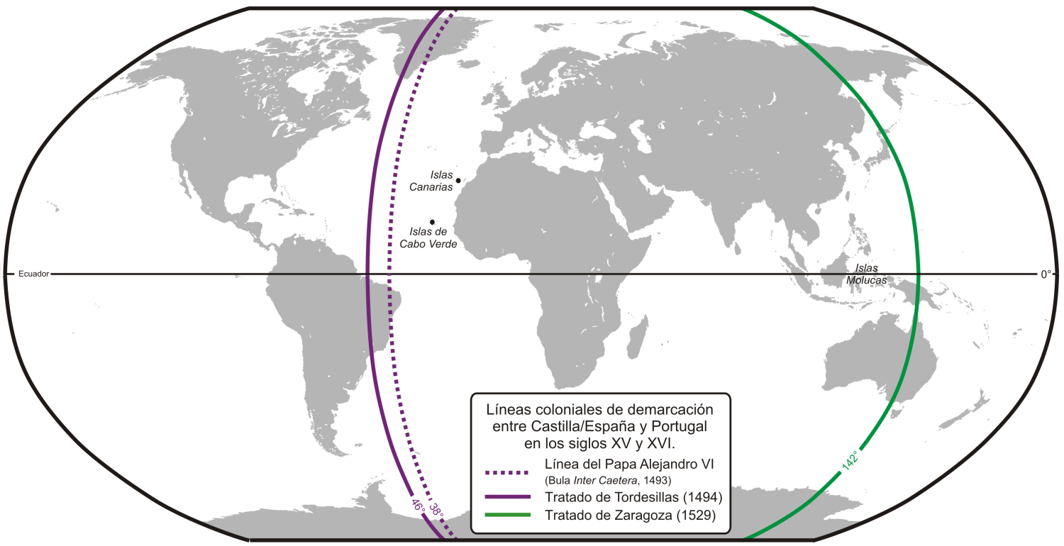 Líneas coloniales de demarcación entre Castilla/España y Portugal en los siglos XV y XVI. (Tratado de Tordesillas and Tratado de Zaragoza)